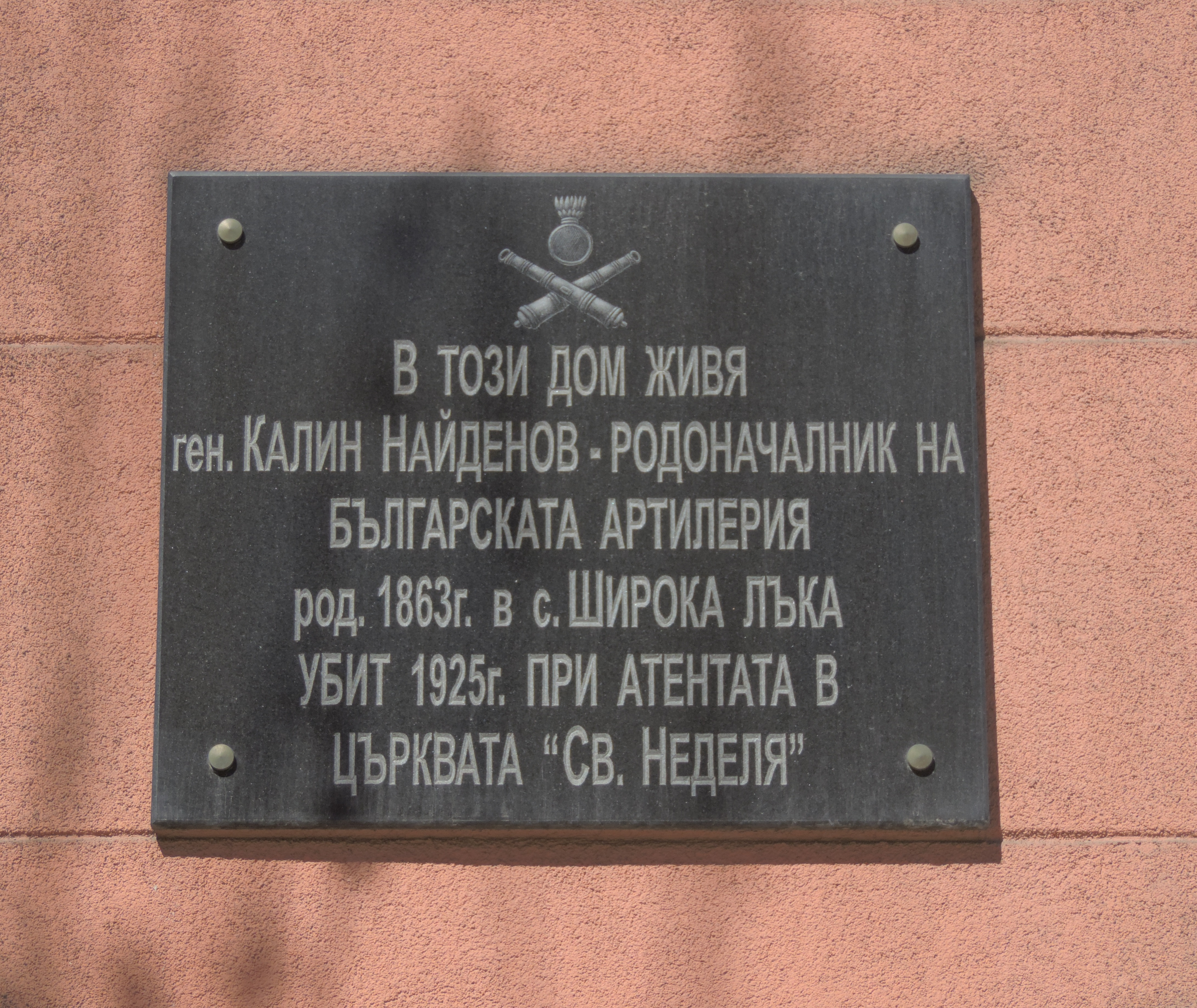 Паметна плоча на дома на Калин Найденов на адрес ул. „Васил Левски“ № 53, София.